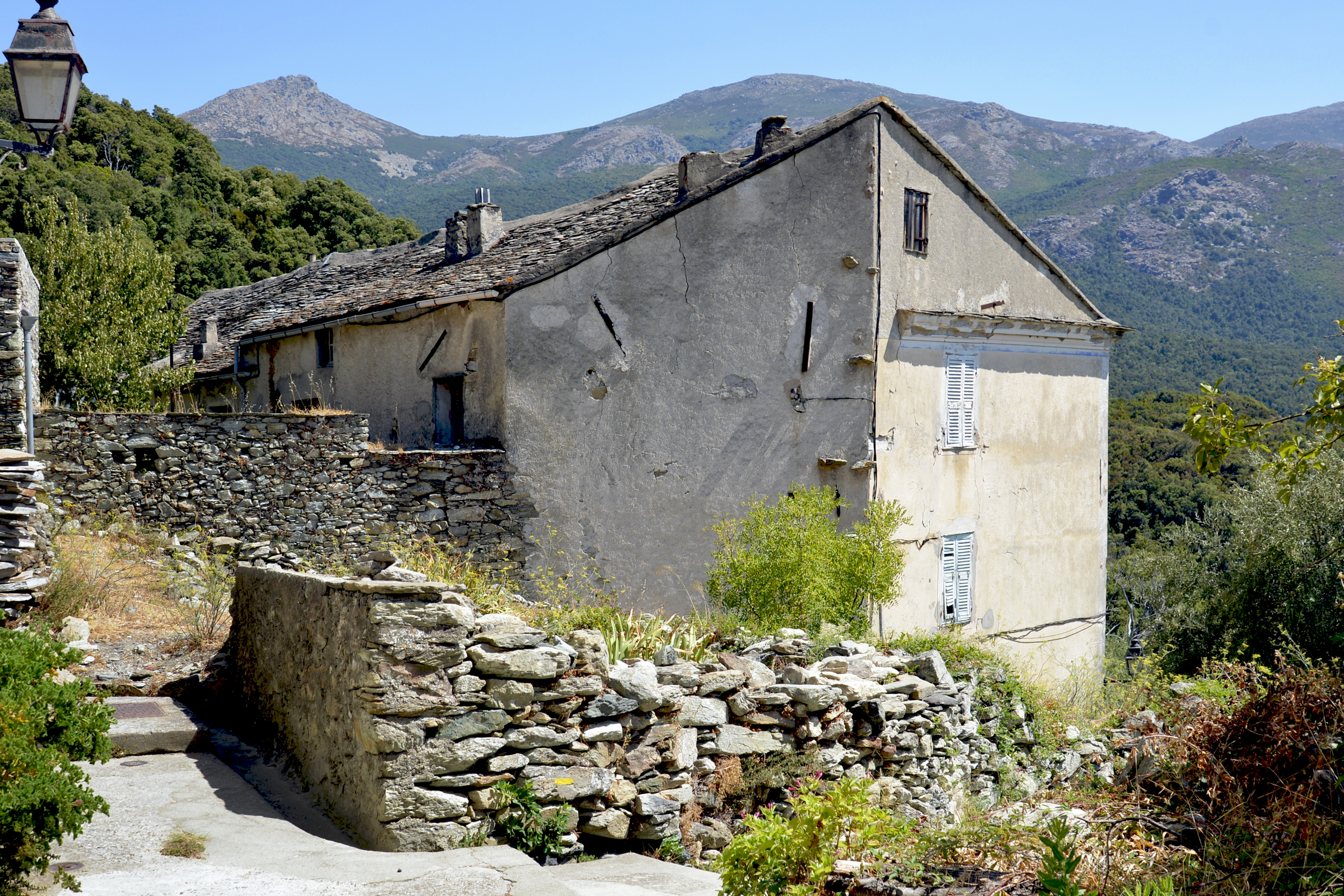 Barrettali, Cap Corse - Habitations anciennes à l'est du hameau de Torre (a Torra).